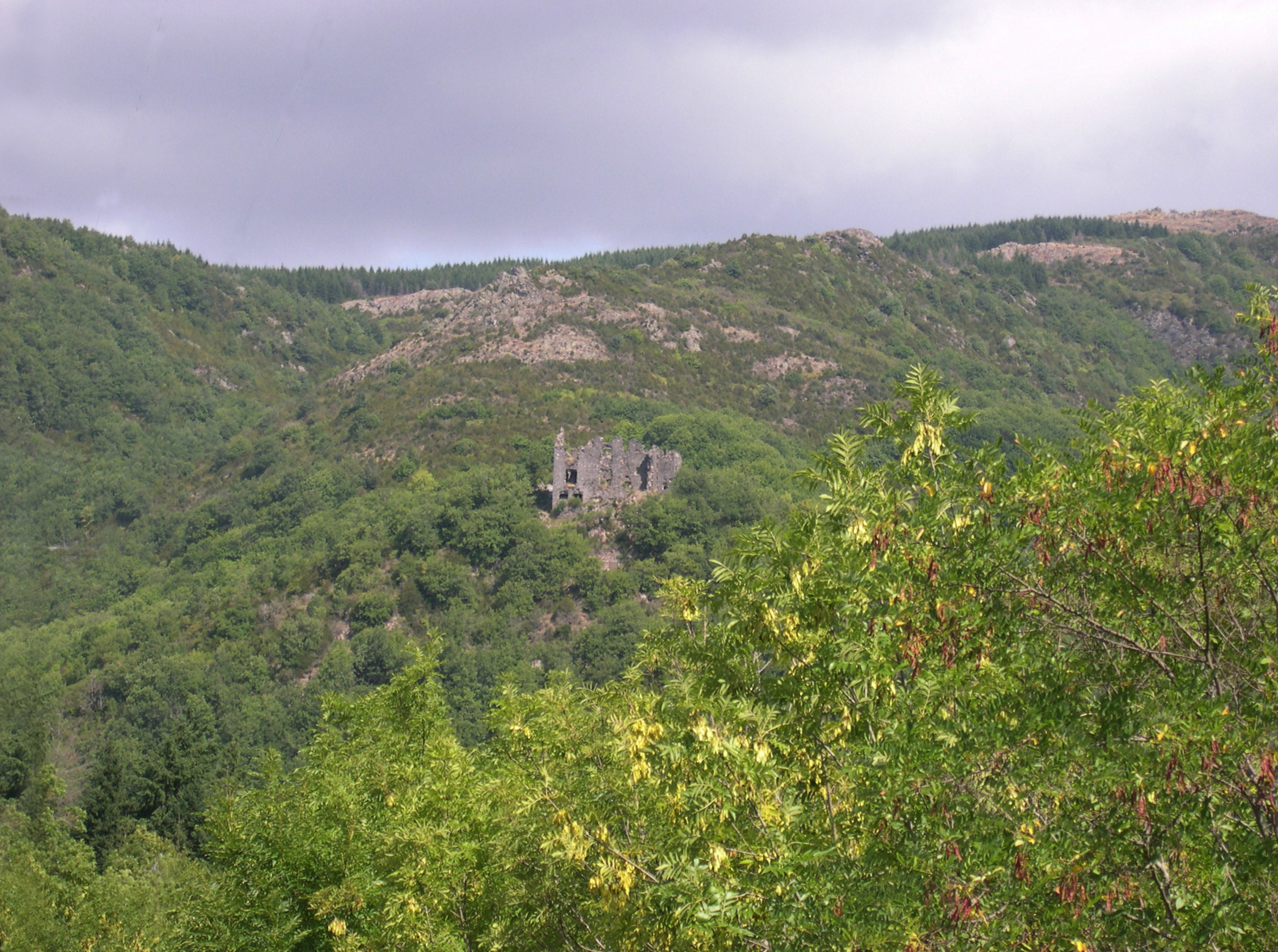 Murat-sur-Vèbre (Tarn) - Ruines du château de Canac.